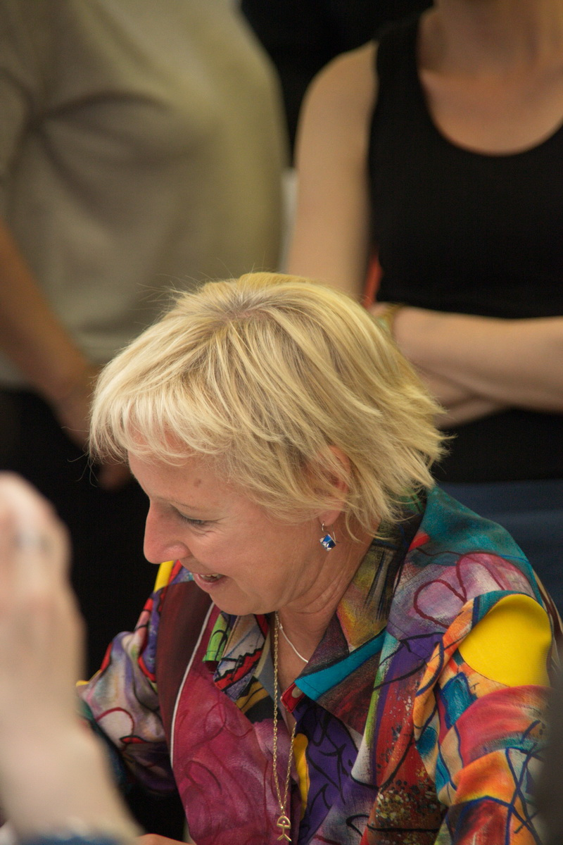 Signatura de llibres en la Diada de Sant Jordi-2015 a Barcelona